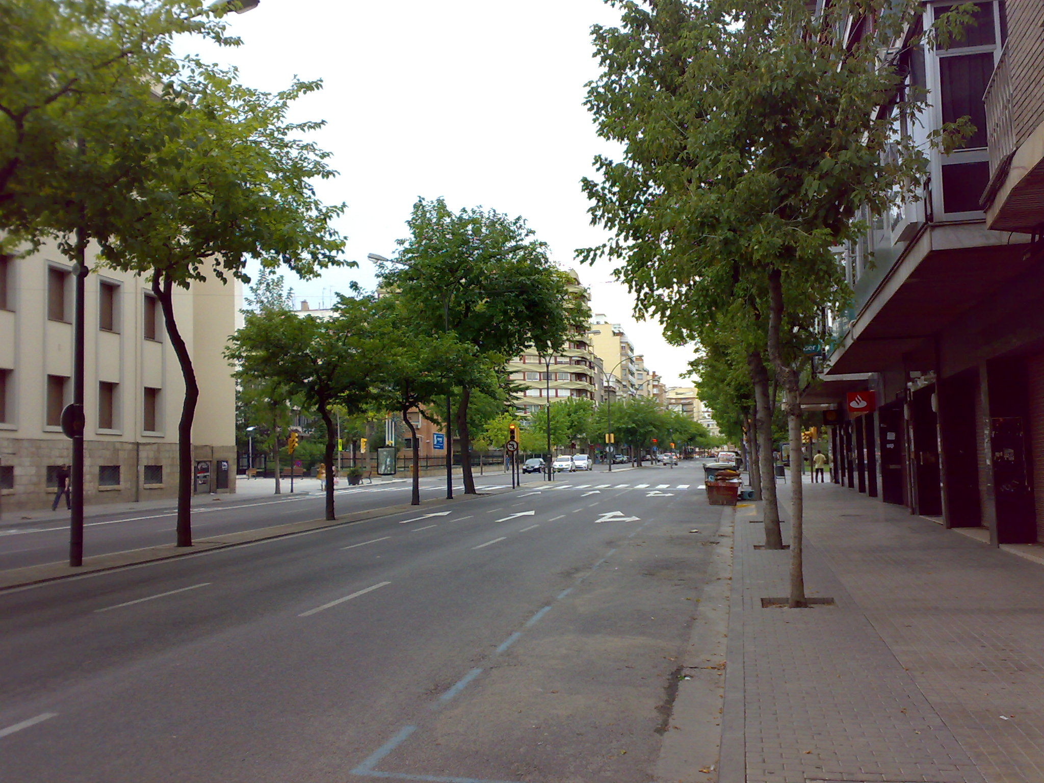 Avinguda Prat de la Riba de la ciutat de Lleida (Catalunya)